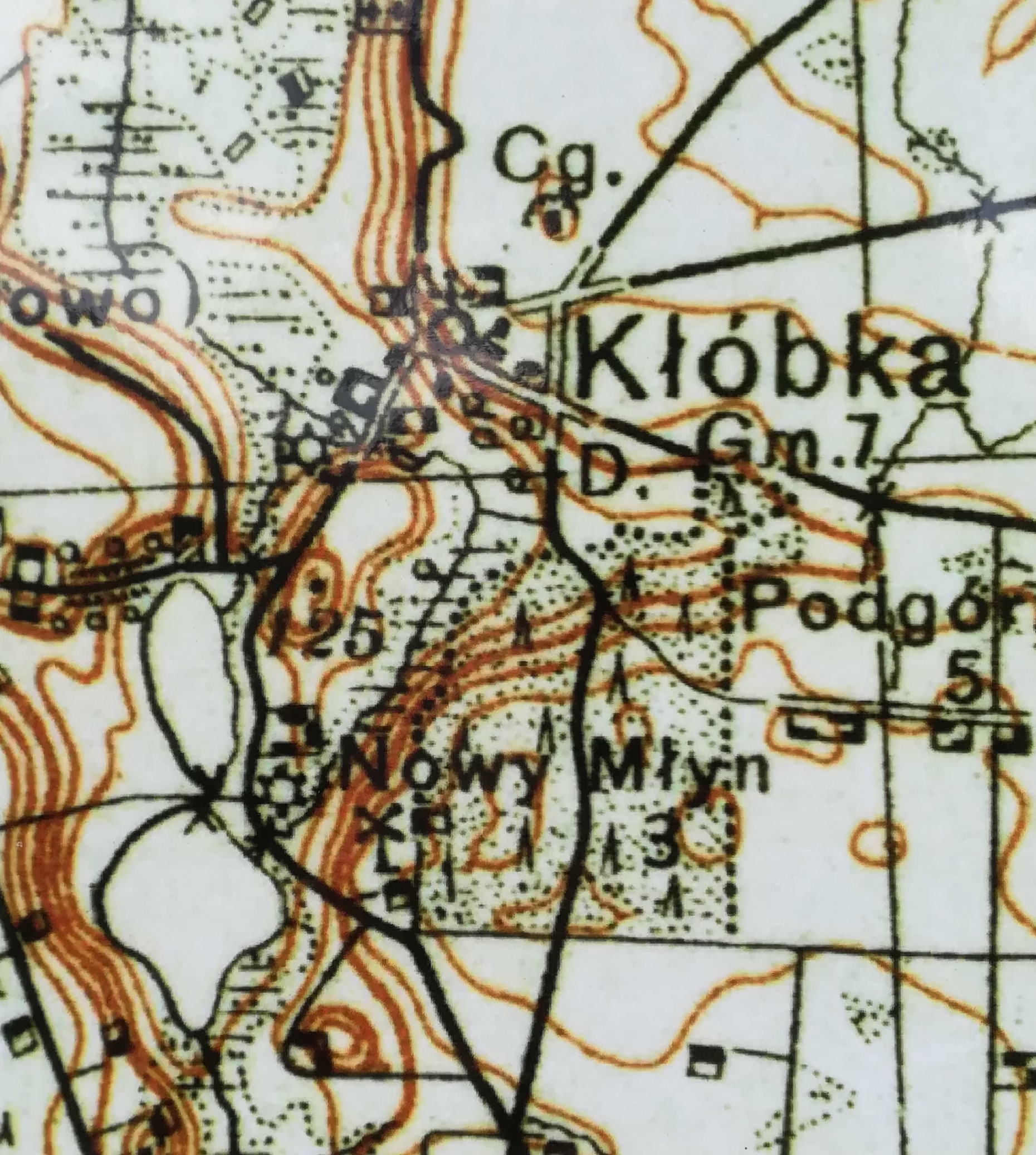 Tablica informacyjna w parku w Kłóbce (Skansen). Polska mapa taktyczna z 1930 r.